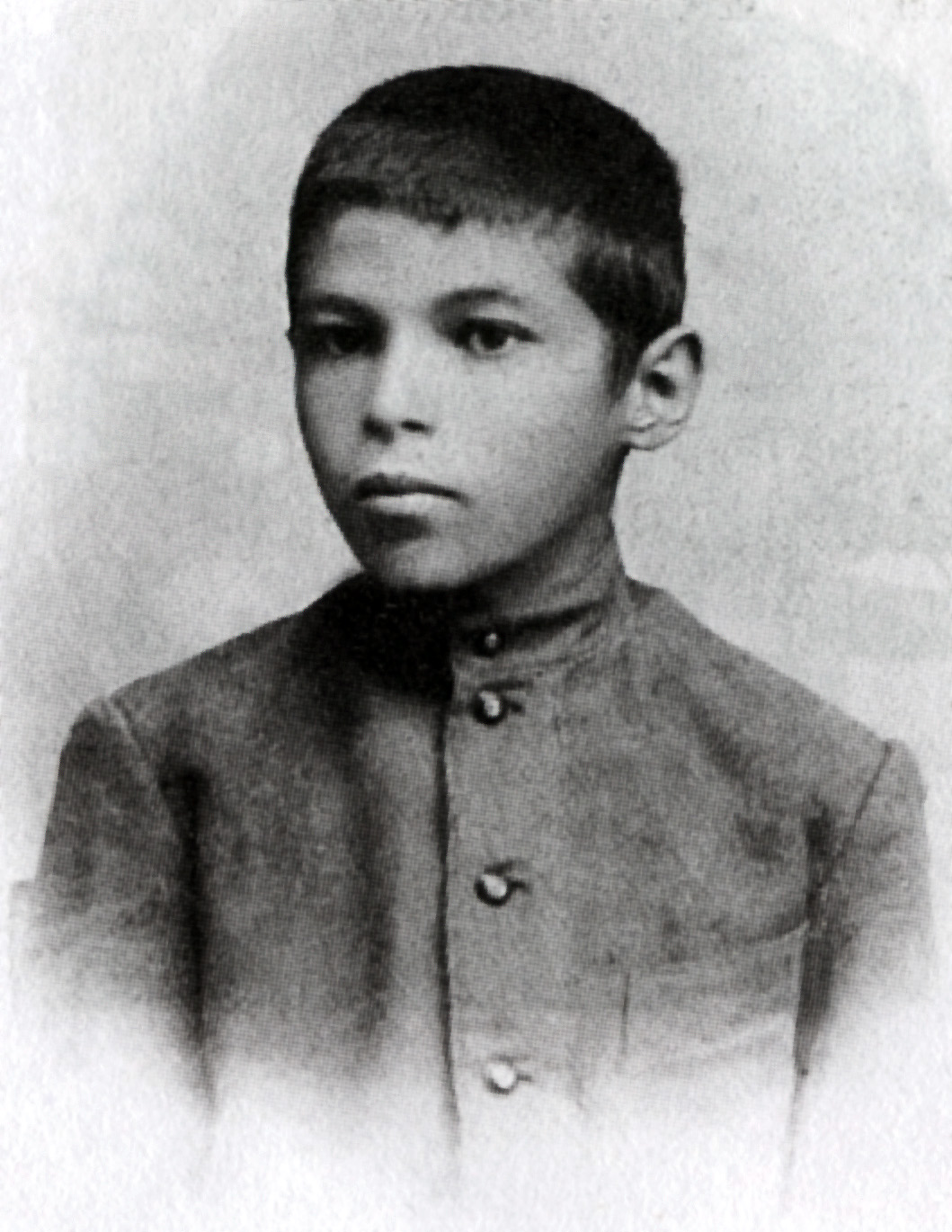 Михайль Семенко в дитинстві.